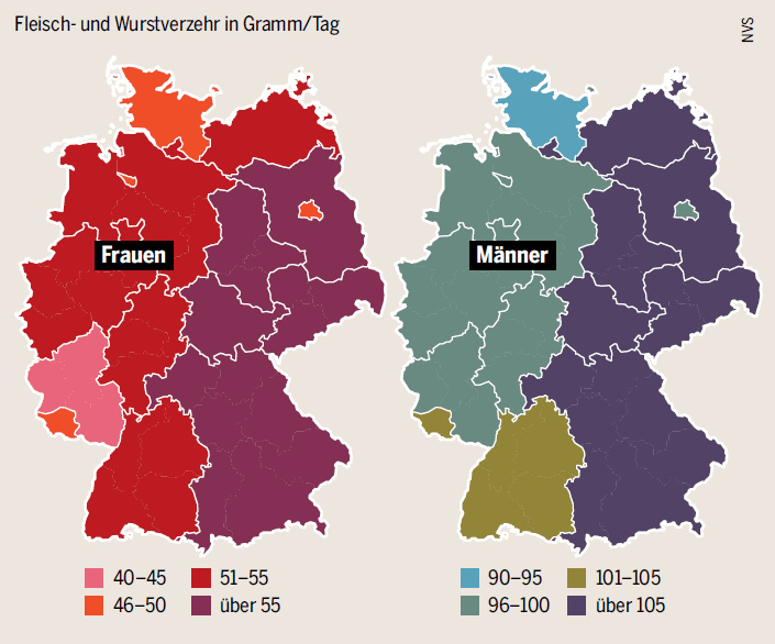 Fleisch- und Wurstverzehr nach Bundesländern und Geschlecht, Quelle: "Fleischatlas" herausgegeben von: Heinrich-Böll-Stiftung, BUND, Le Monde diplomatique (Daten aus der Nationalen Verzehrsstudie)